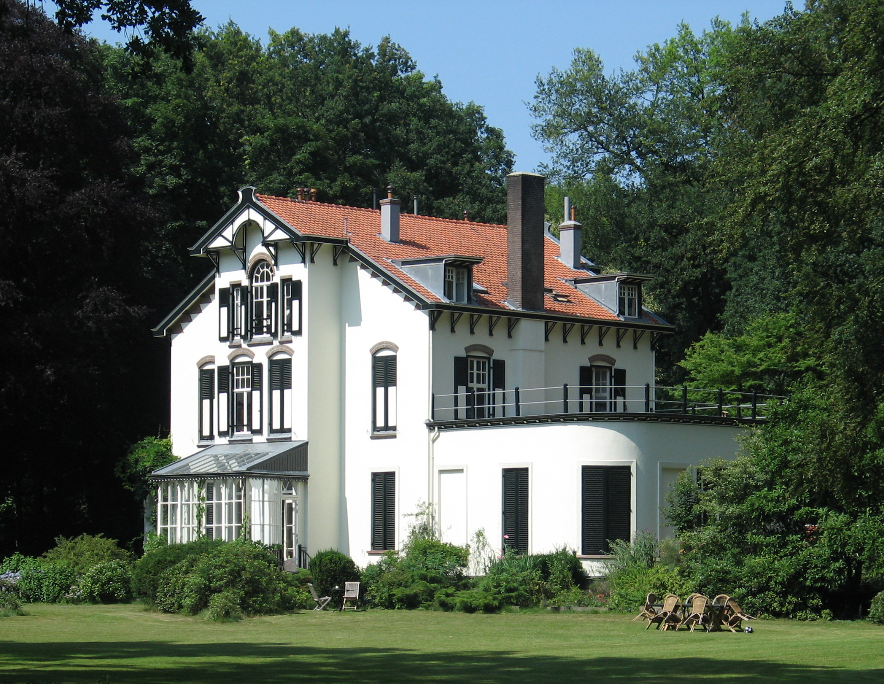 Onderdeel van Kasteel Hoekelum, Bennekom Huis Noordereng, op terrein kasteel Hoekelum, rijksmonument